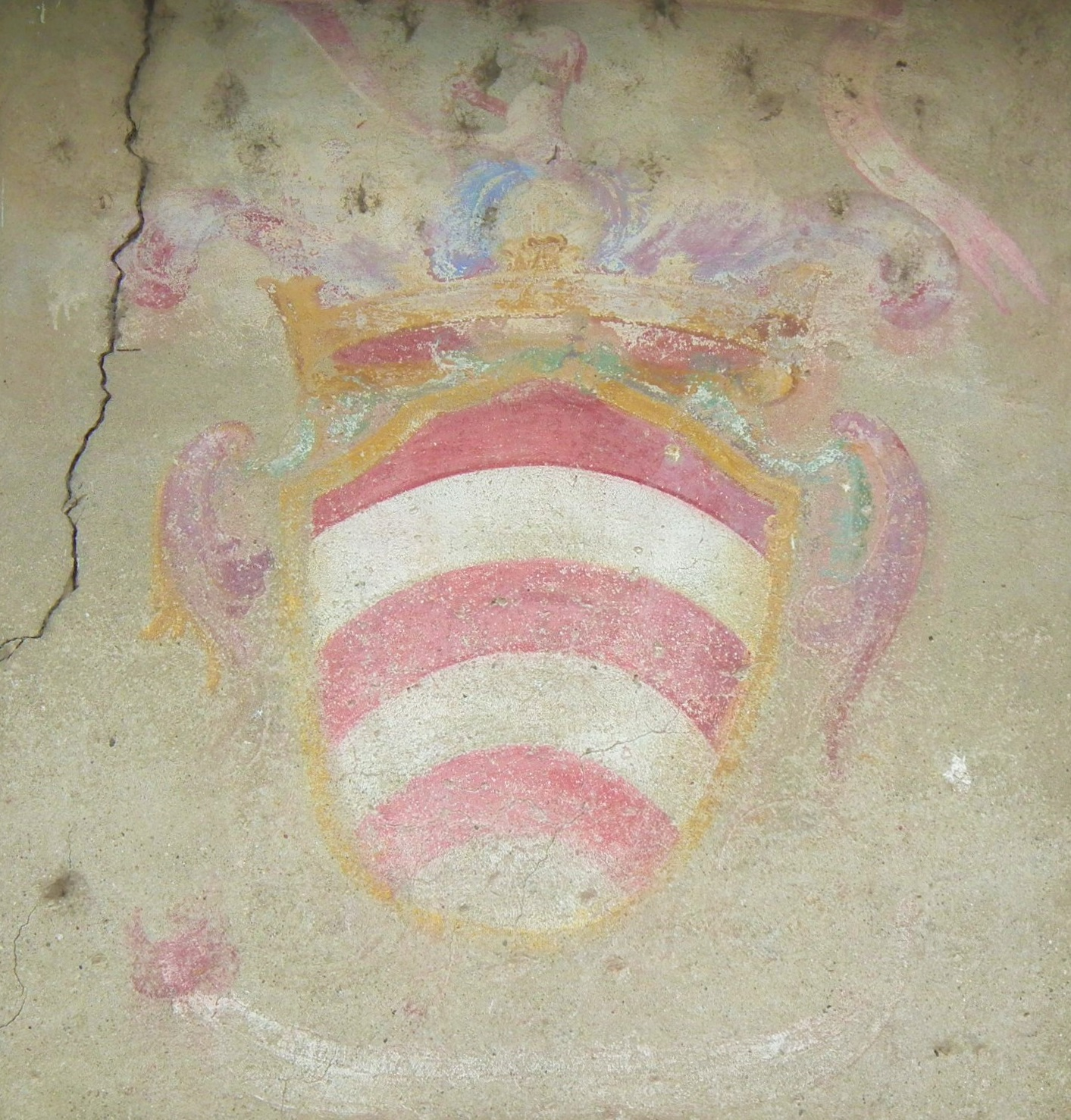 Dettaglio dell'esterno della Chiesa di Sant'Antonio nel comune di Mandello Vitta in cui è mostrato lo stemma nobiliare della famiglia Caccia.